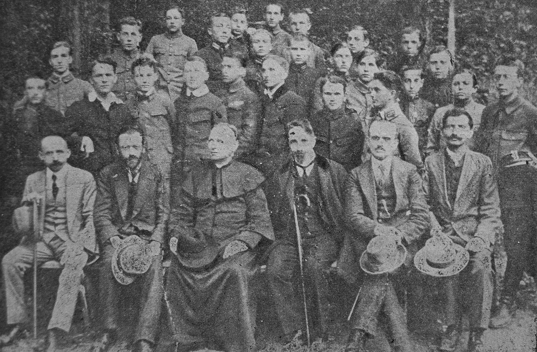 Uczniowie klasy VI C. K. Gimnazjum Męskiego w Sanoku. U dołu od lewej nauczyciele: Józef Rec, Roman Kowalów, ks. dr Józef Drozd, Ihilii Ghelb, Michał Milski, Ignacy Korman